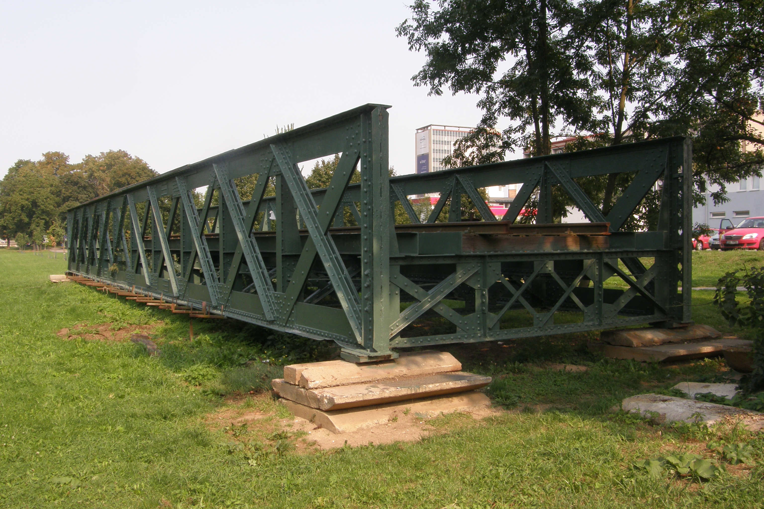 Železniční most - tzv. Ježkův most, z toho jen: příhradová část (Blansko), Blansko